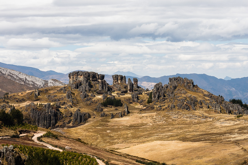 Cumbemayo, Cajamarca.